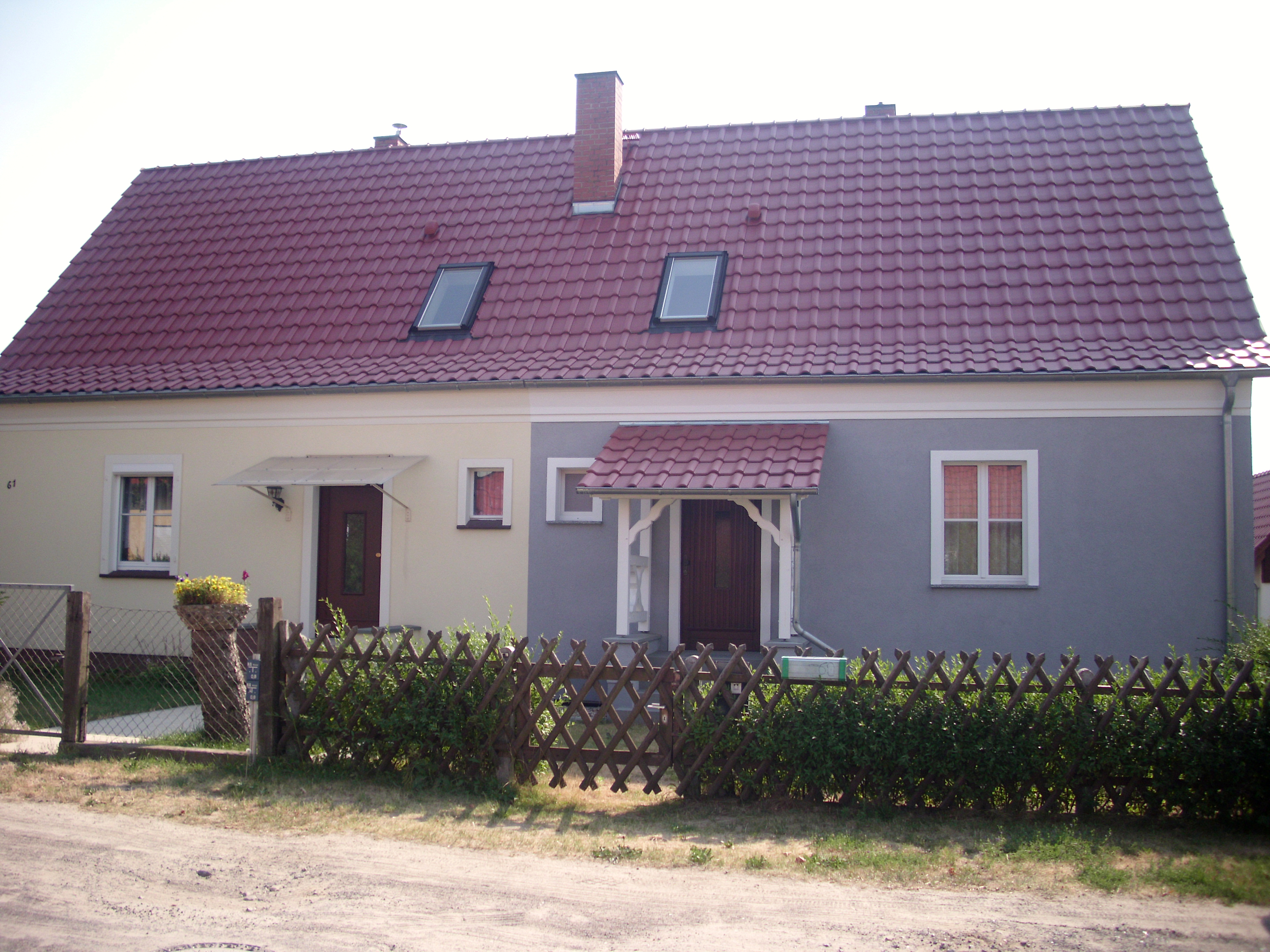 Doppelwohnhaus für Traktoristen, Ernst-Senckel-Weg 60/61 in Hohenwalde, Frankfurt (Oder), Brandenburg, Deutschland